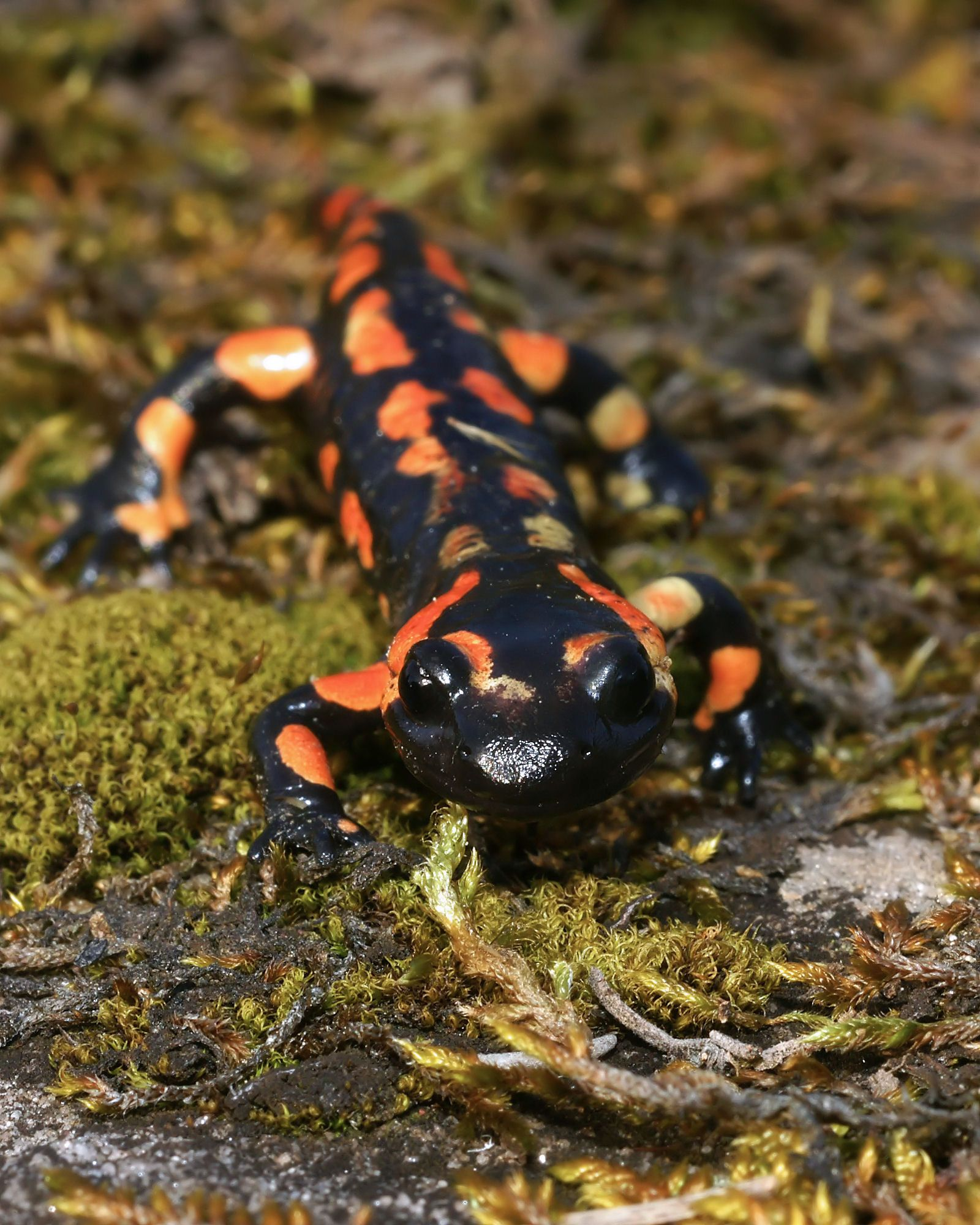 Salamandra salamandra juvenile